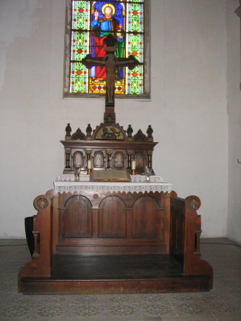 Altar der St.-Nikolai-Kirche Baalberge, Stadt Bernburg (Saale).